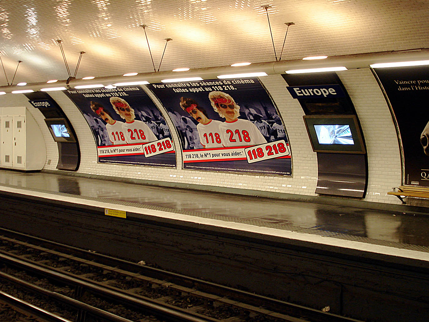 Station Europe de la ligne 3 du métro de Paris, France.